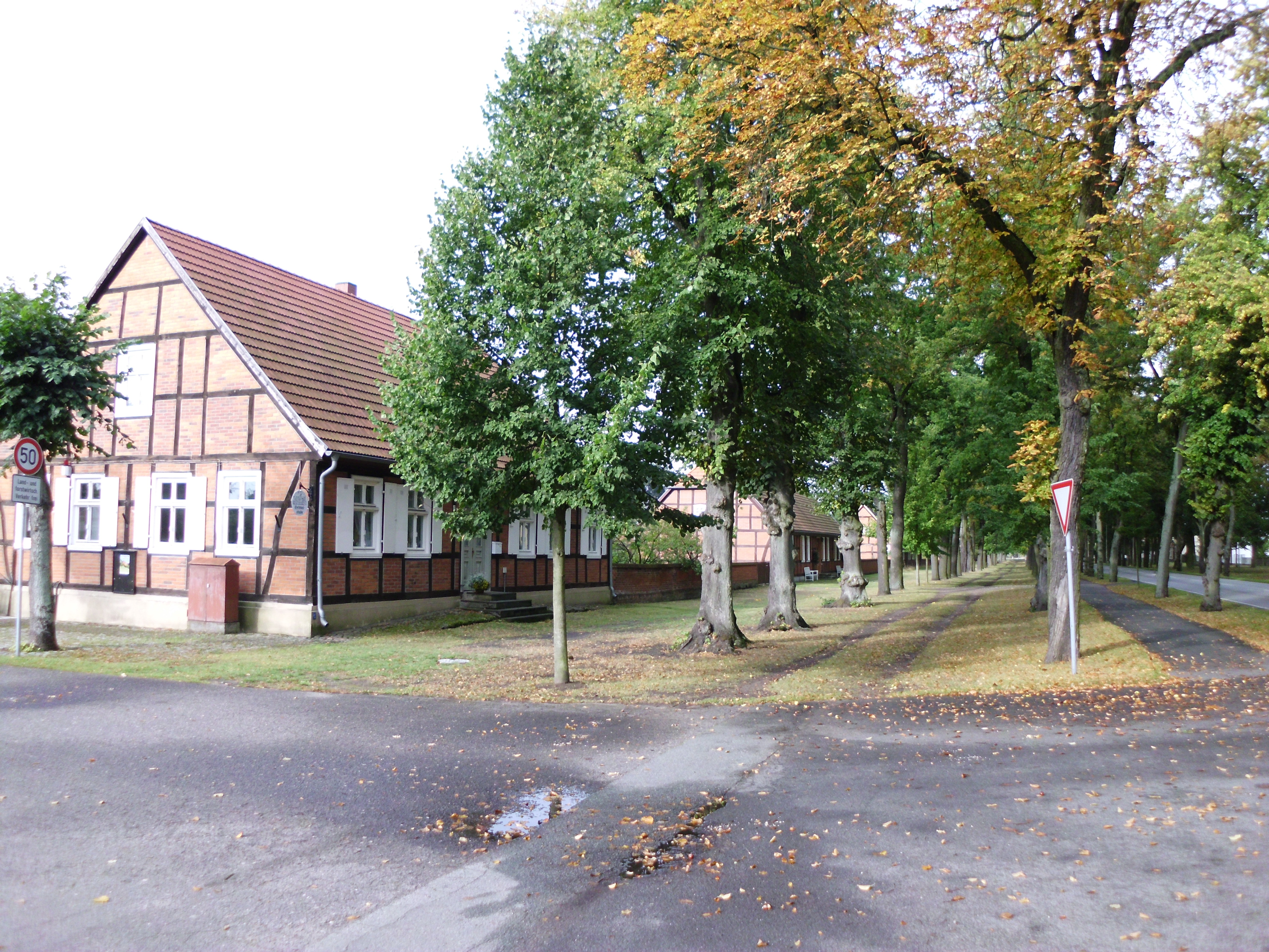 denkmalgeschützte Dorfanlage in Groß Breese, Gemeinde Breese, Prignitz